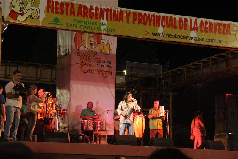 Fiesta de la Cerveza 2015 - Actuación de Mario Pereyra y Su Banda